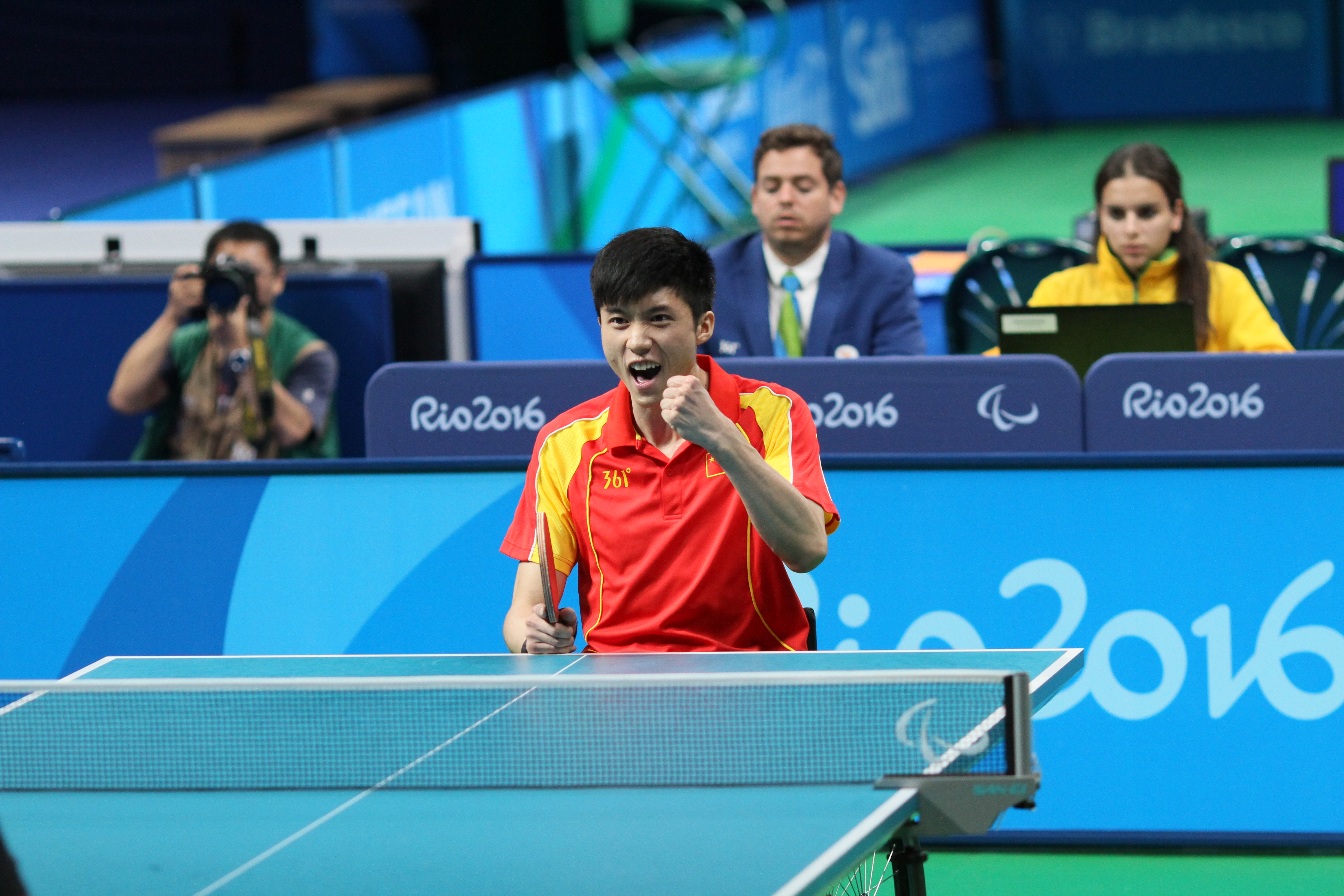 ZHAI Xiang (CHN,M3) IMG_6115